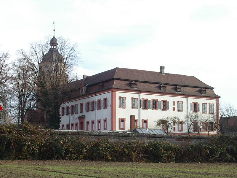 Großgründlach, stadtteil von Nürnberg, schloß, ansicht von wn (16.11.2003). Im hintergrund die kirche.